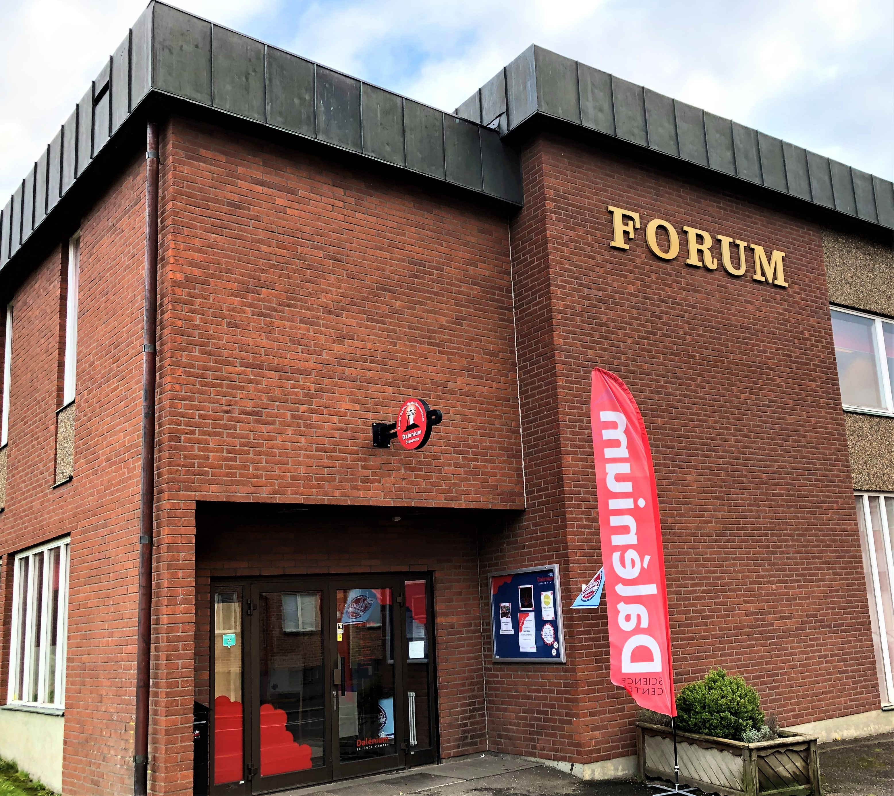 Entré till Dalénium science center